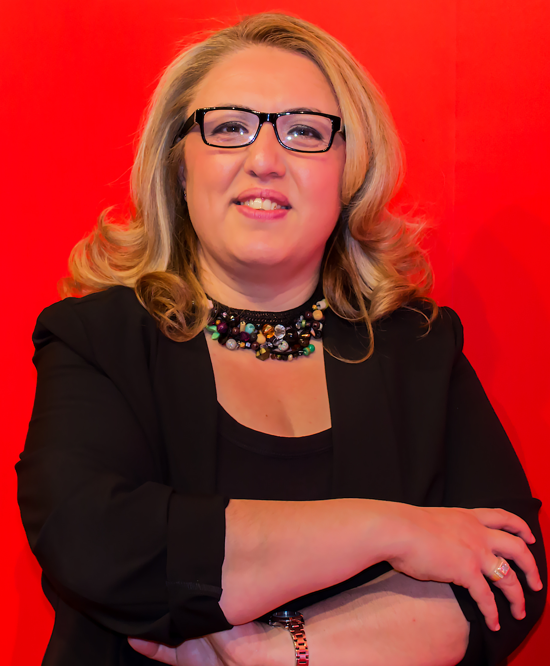 Landtagsabgeordnete in Schleswig-Holstein für Kiel-West